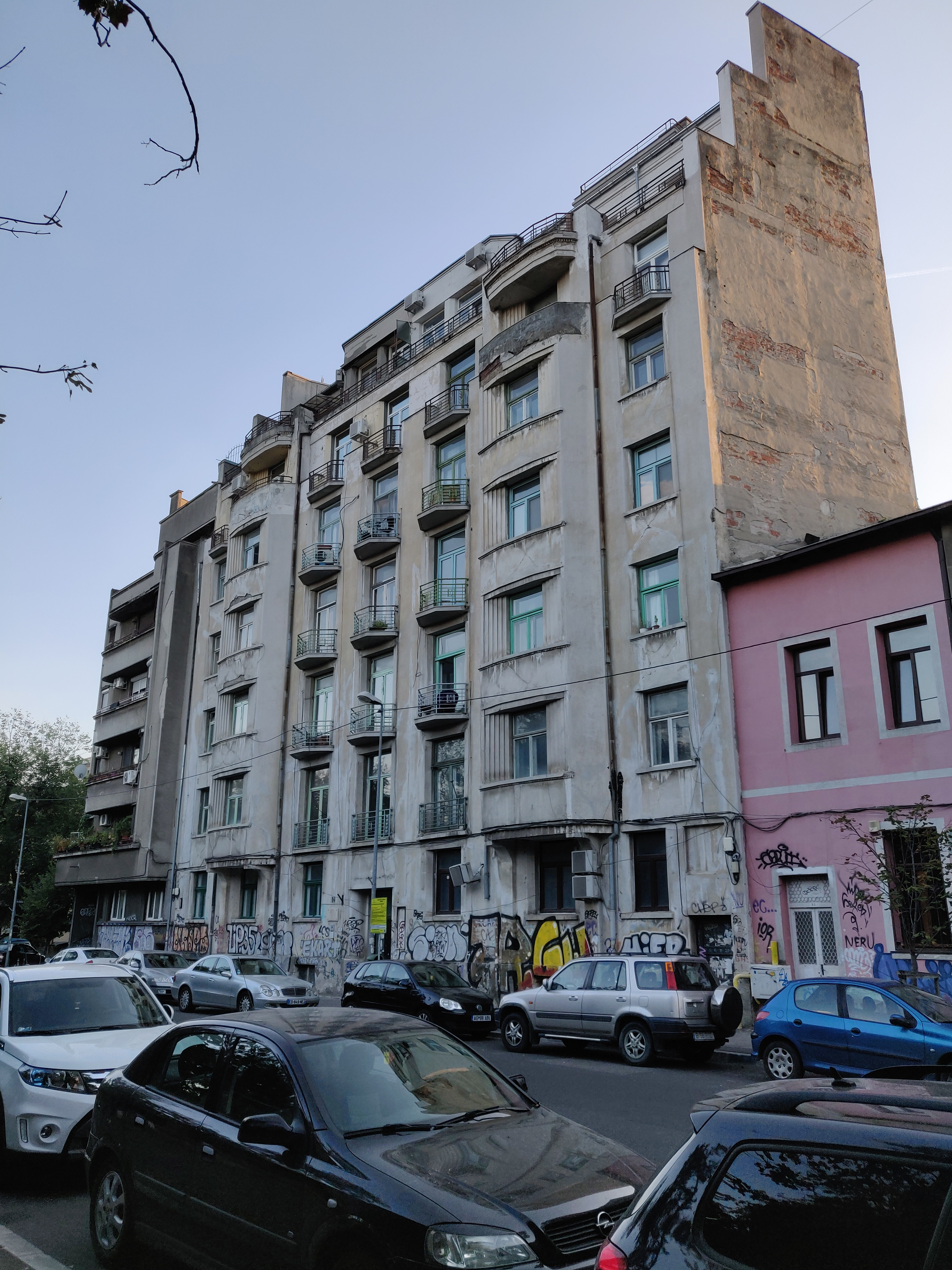 Imobil